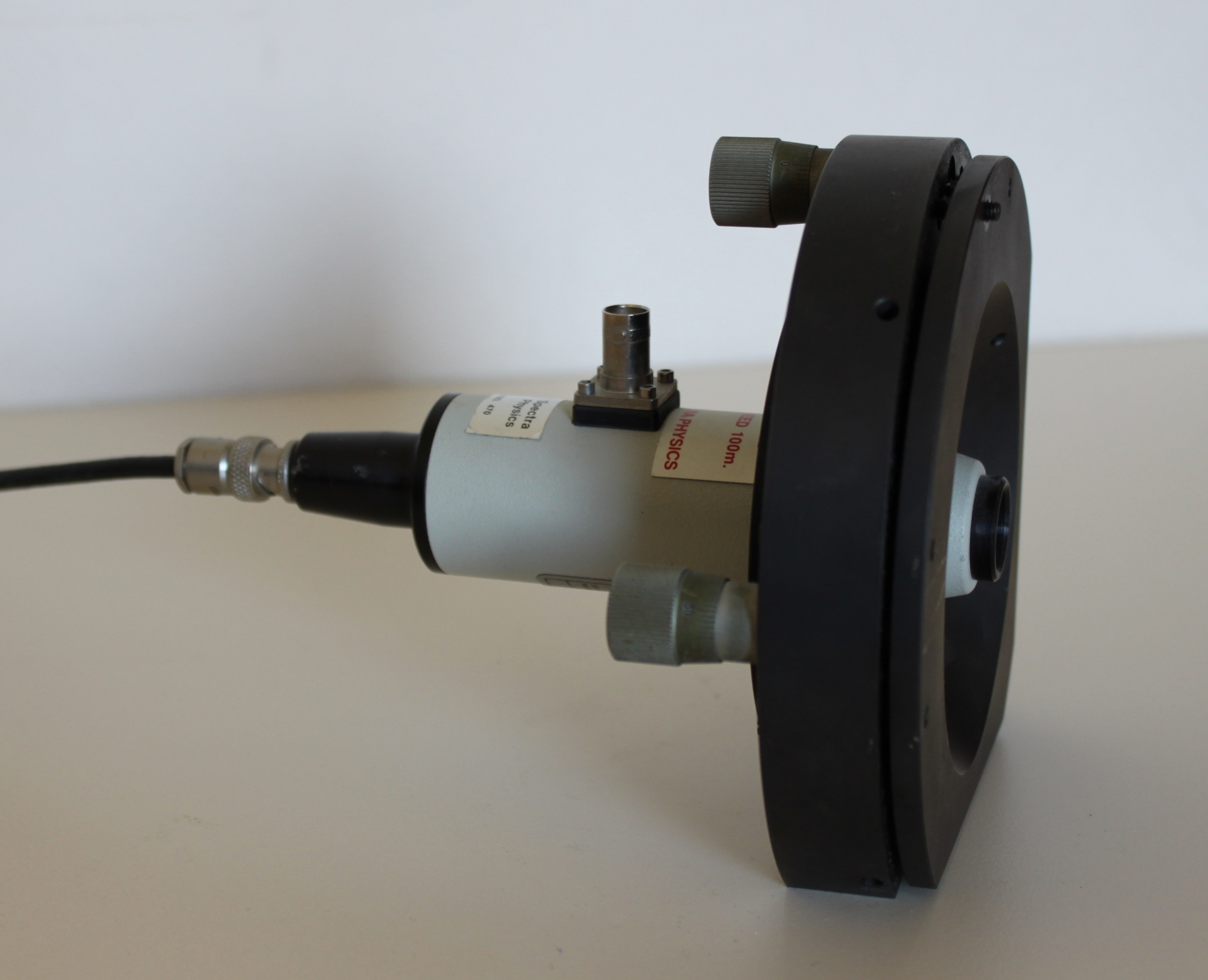 Interféromètre de Perot-Fabry. Modèle de la société Spectra-Physics (model 470 confocal). Ancien équipement utilisé au Laboratoire de Physique de l'Université de Bourgogne (désormais Laboratoire Interdisciplinaire CARNOT de Bourgogne), équipe Solitons Lasers et Communications Optiques. Le dispositif est désormais utilisé dans le cadre des travaux pratiques du département de Physique de l'UFR Sciences et Techniques.